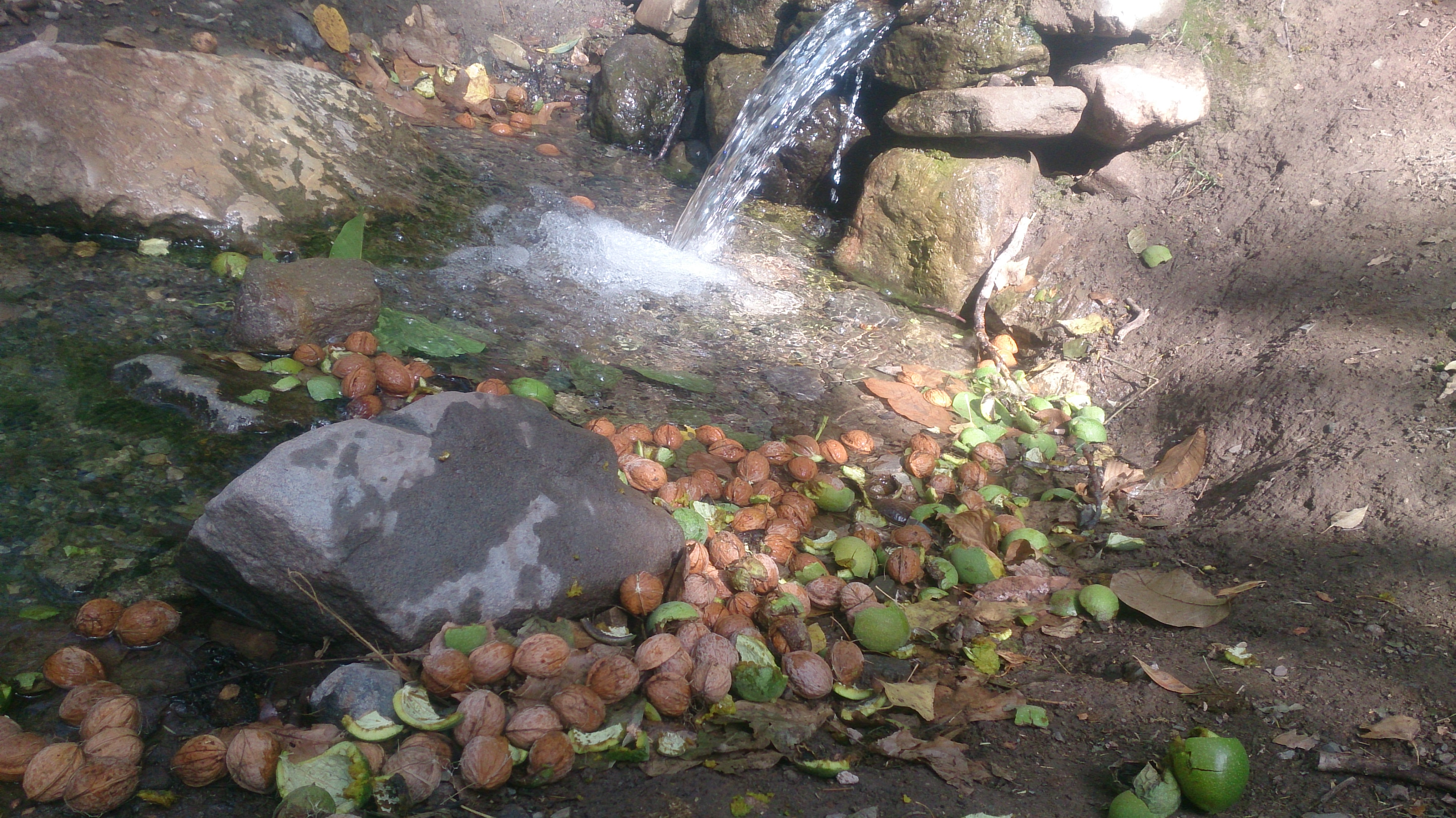 برداشت گردو (گردوتکانی) در دامنه